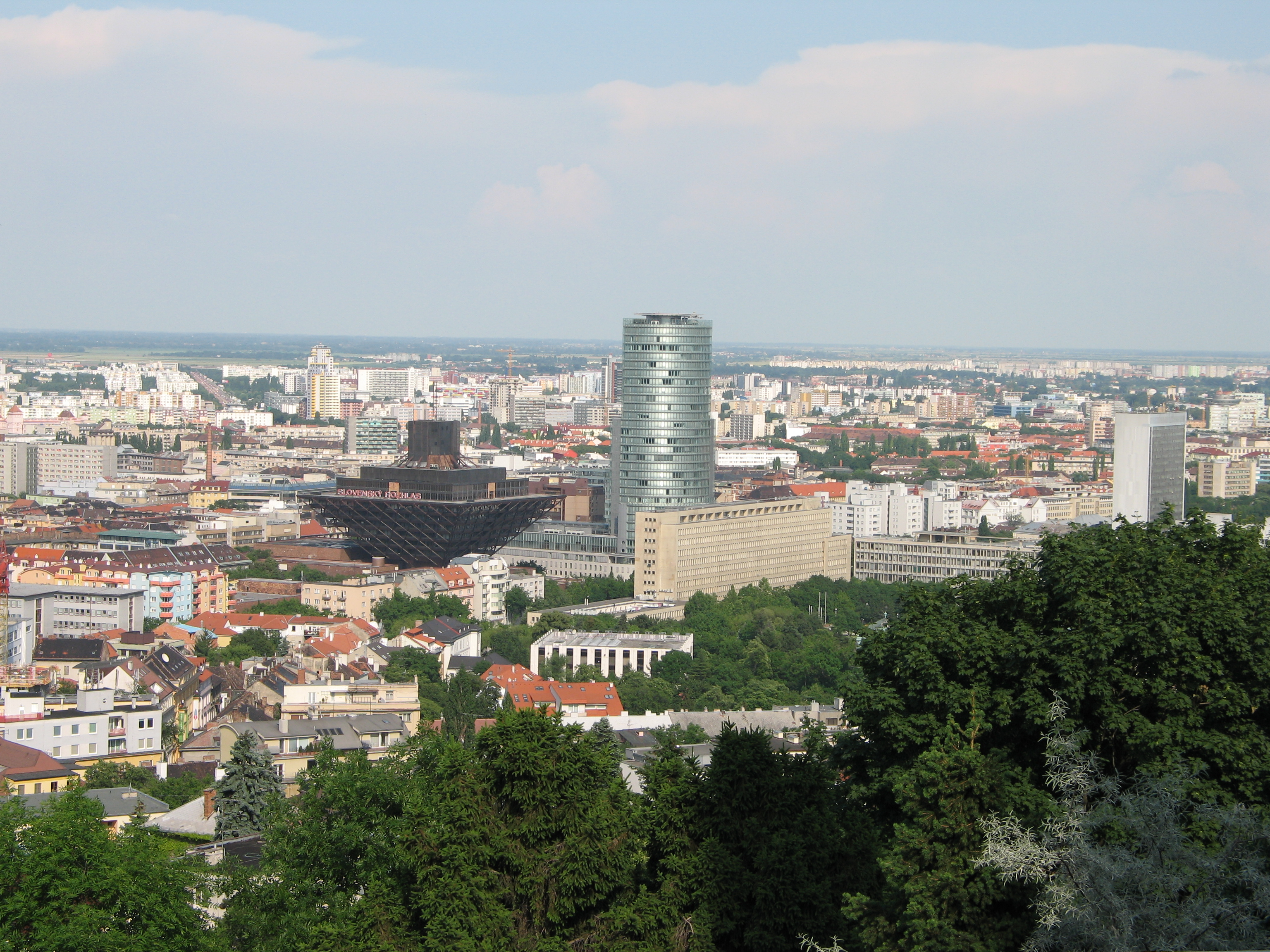 Bratislava, budova Slovenského rozhlasu a budova národnej banky